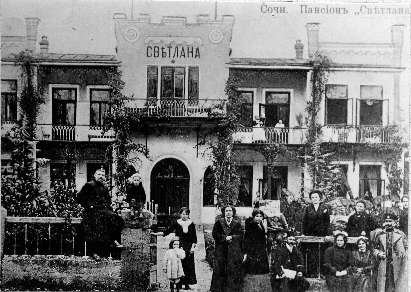 Svetlana sanatorium in Sochi, Russia (ca 1910)